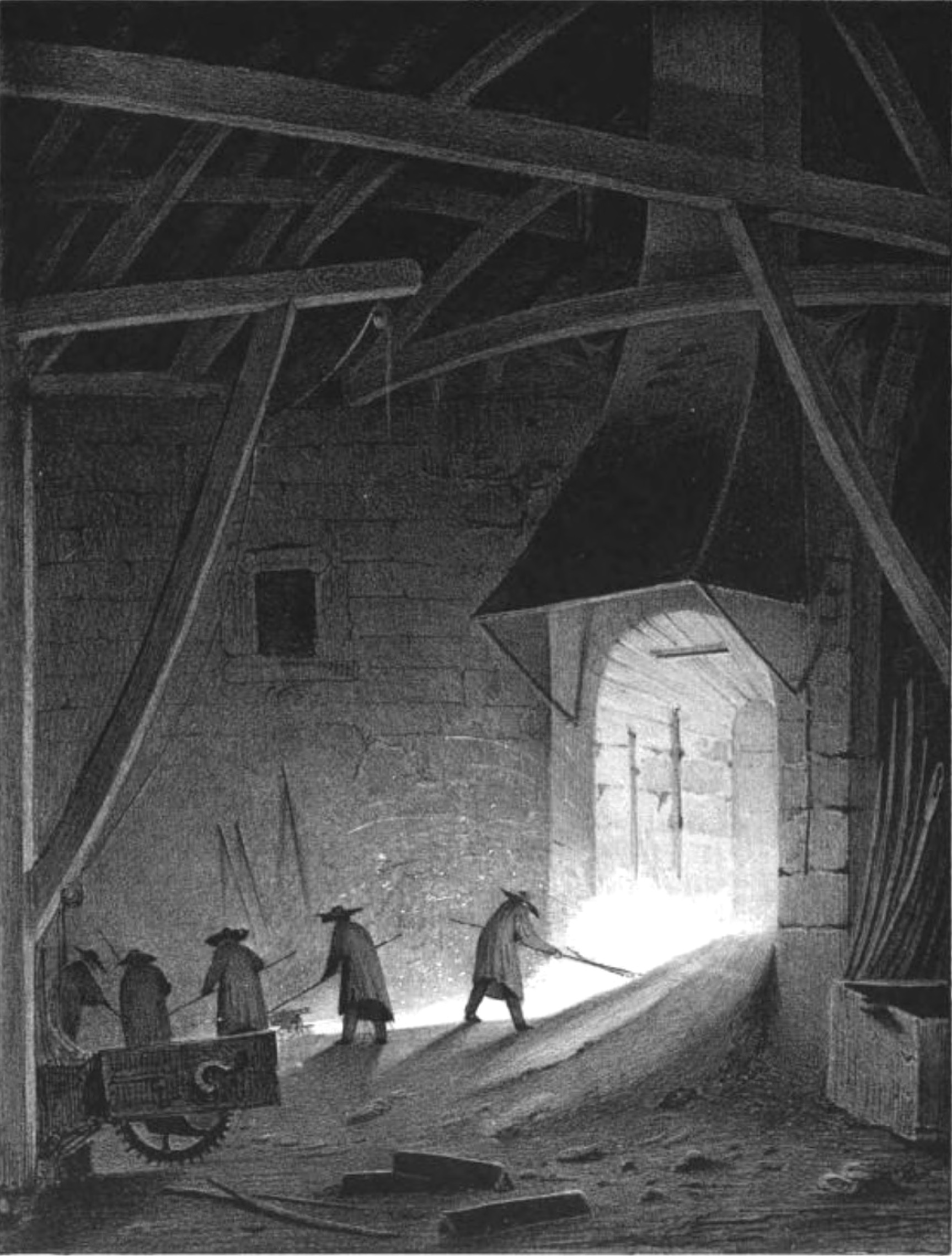 Album du Dauphiné - tome III, litographie d'un haut-fourneau d'Allevard